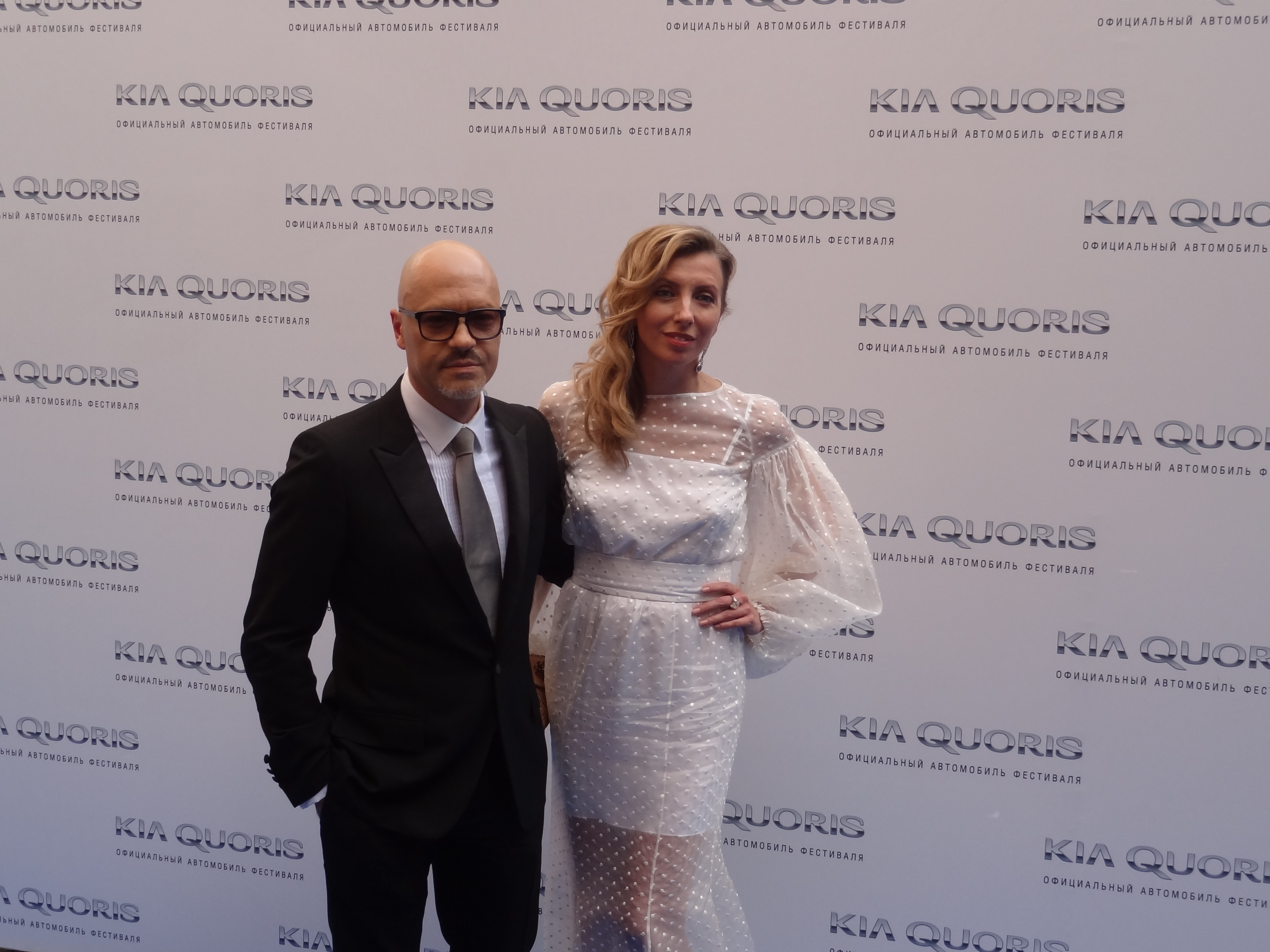 Федор и Светлана Бондарчук на церемонии открытия фестиваля "Кинотавр - 2013" в Сочи.